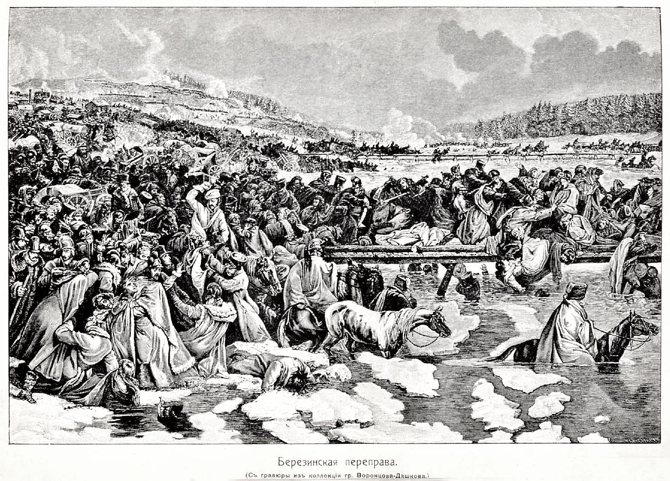 Данное изображение было использовано в статье «Березина» опубликованной в четвёртом томе «Военной энциклопедии», который был издан книгоиздательским товариществом Ивана Дмитриевича Сытина в 1911 году в столице Российской империи городе Санкт-Петербурге.